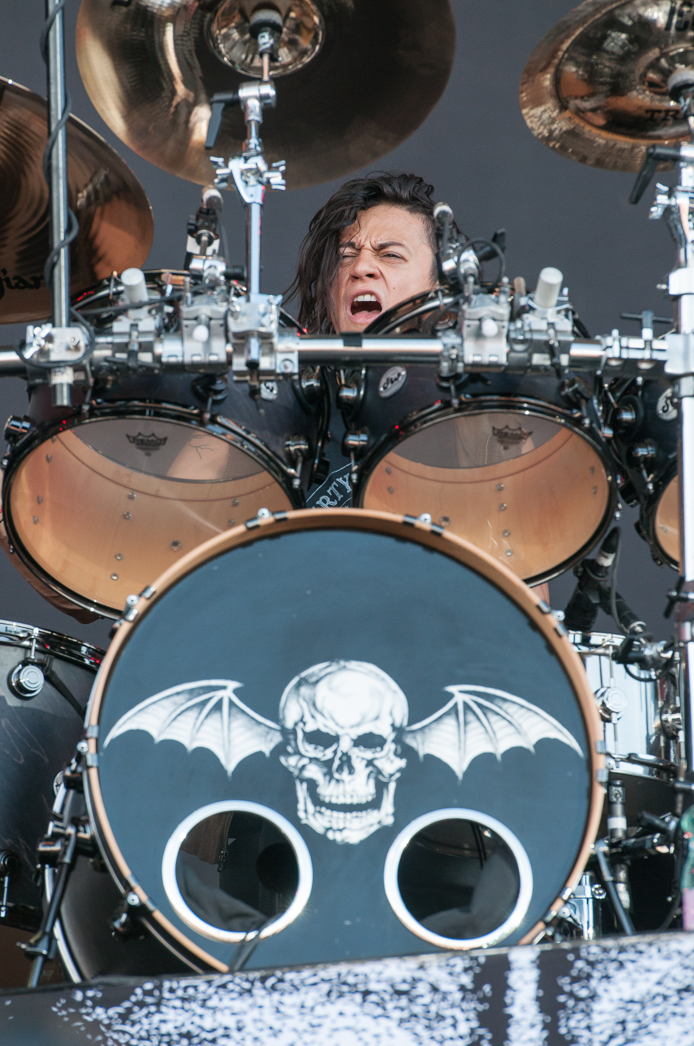 ARGO-Konzerte,Arin Ilejay,Avenged Sevenfold,Konzert,Livekonzert,Livemusik,Musik,RiP,Rock im Park 2014